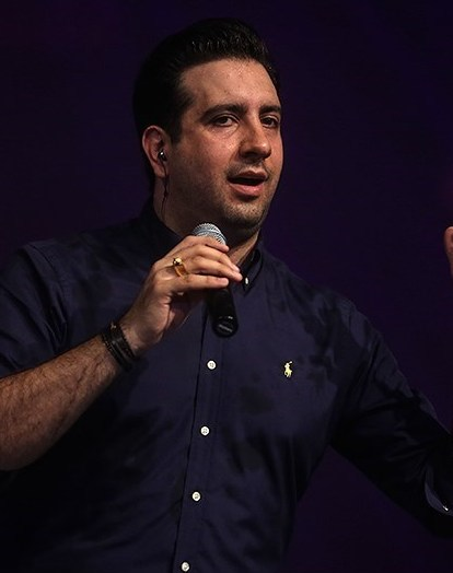 کنسرت امید حاجیلی - کیش